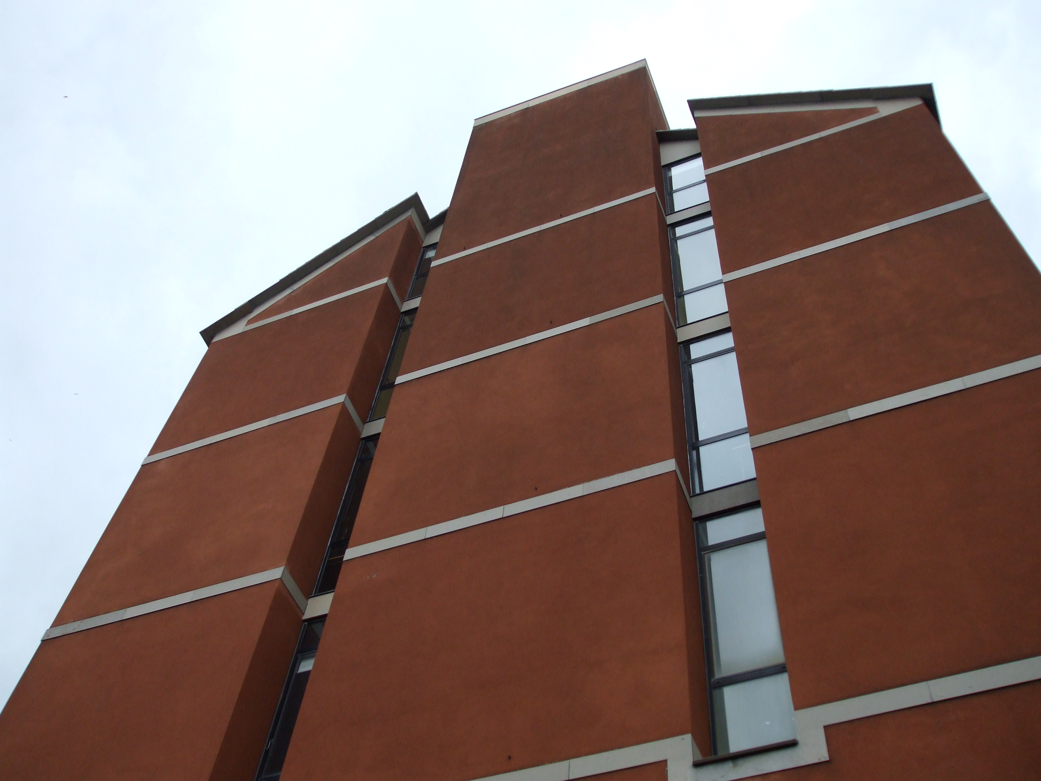 Facciata ovest della stecca progettata da Gardella per le aule della Facoltà di Architettura di Genova